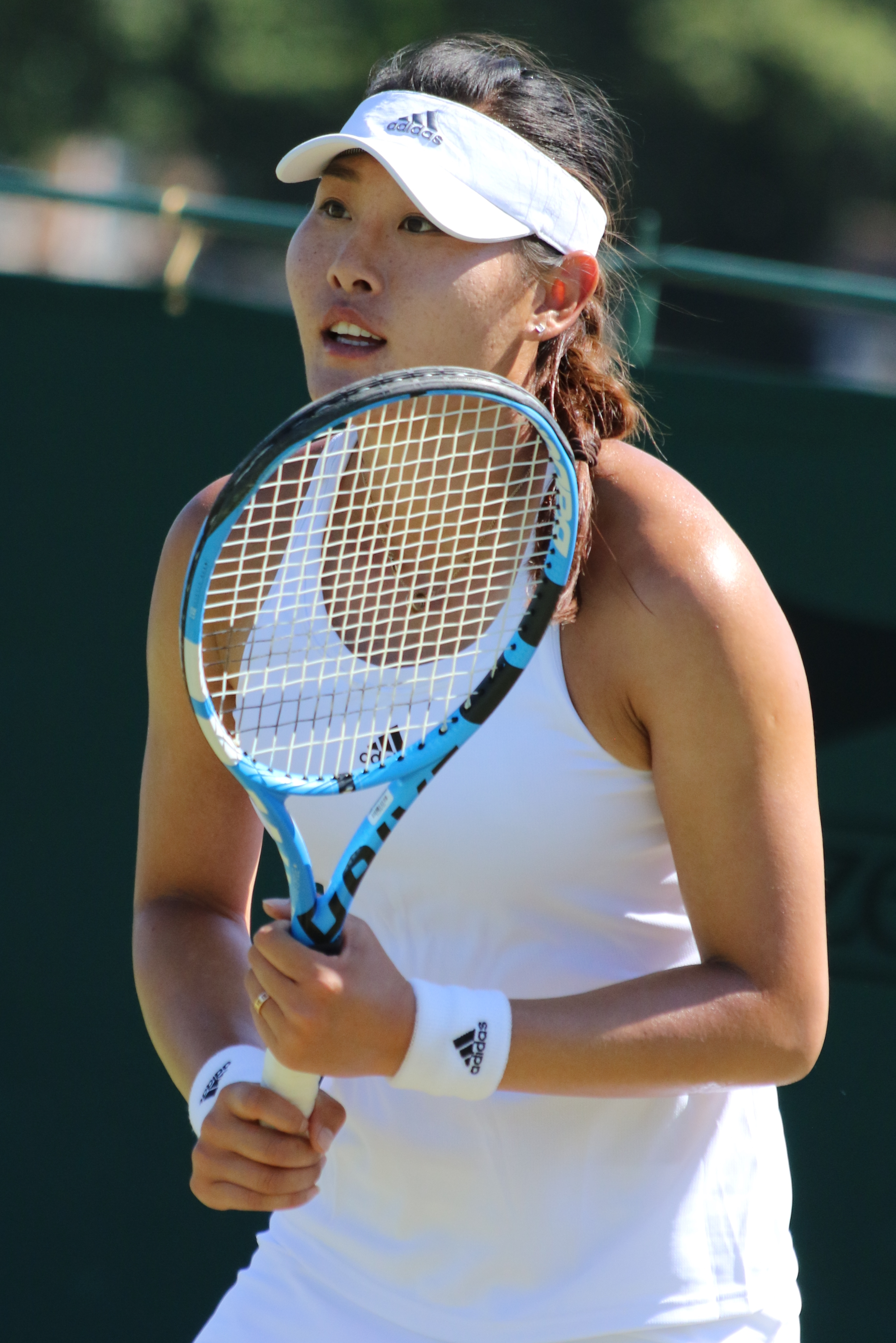 Duan WMQ18 (15)